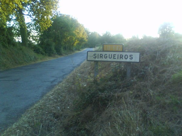 Cartel de una de las entradas al pueblo de Sirgueiros.